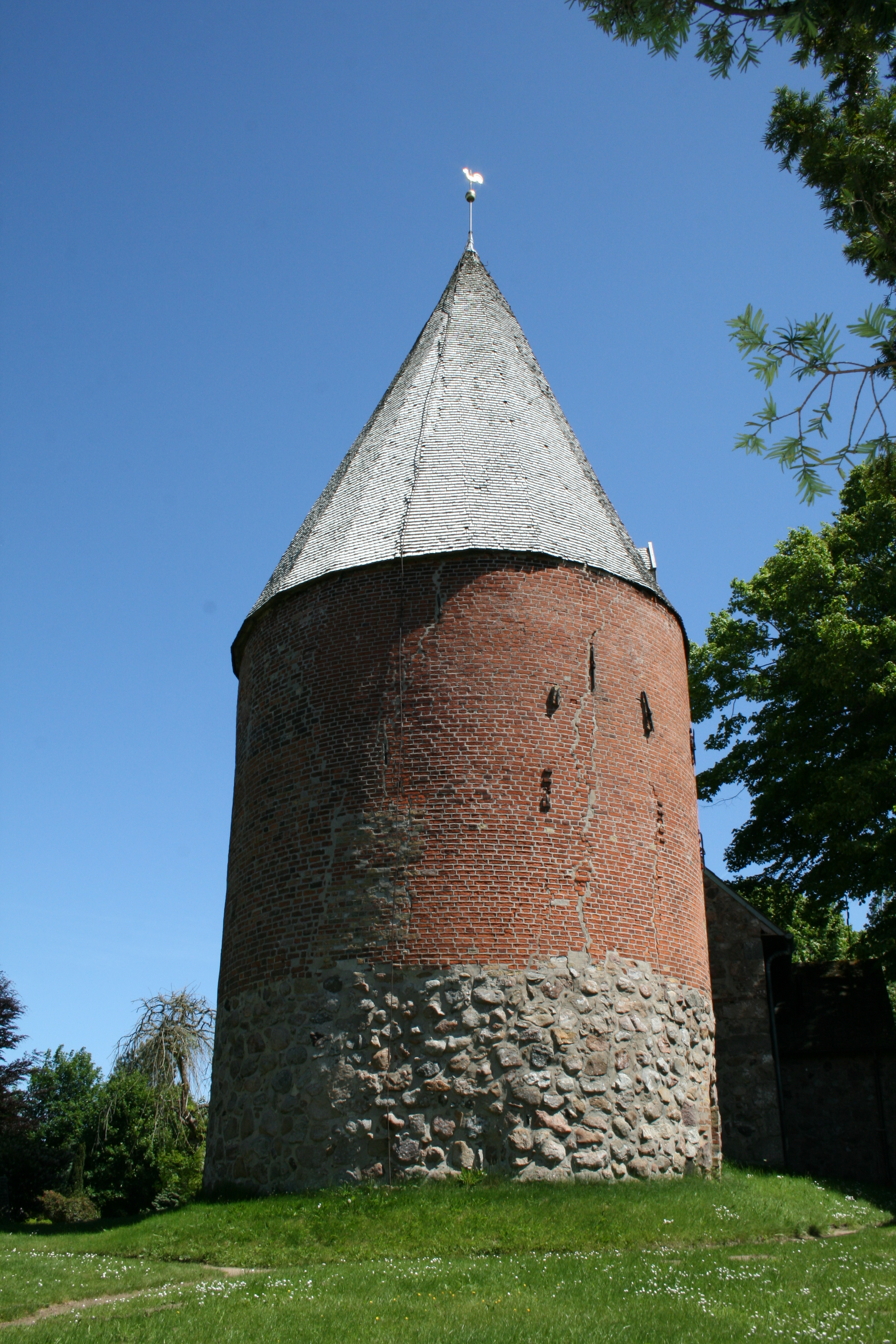 Rundturm der Laurentius-Kirche Kosel (Schleswig-Holstein)